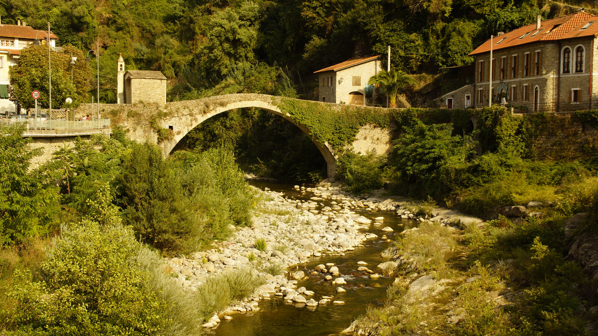 18010 Badalucco IM, Italy